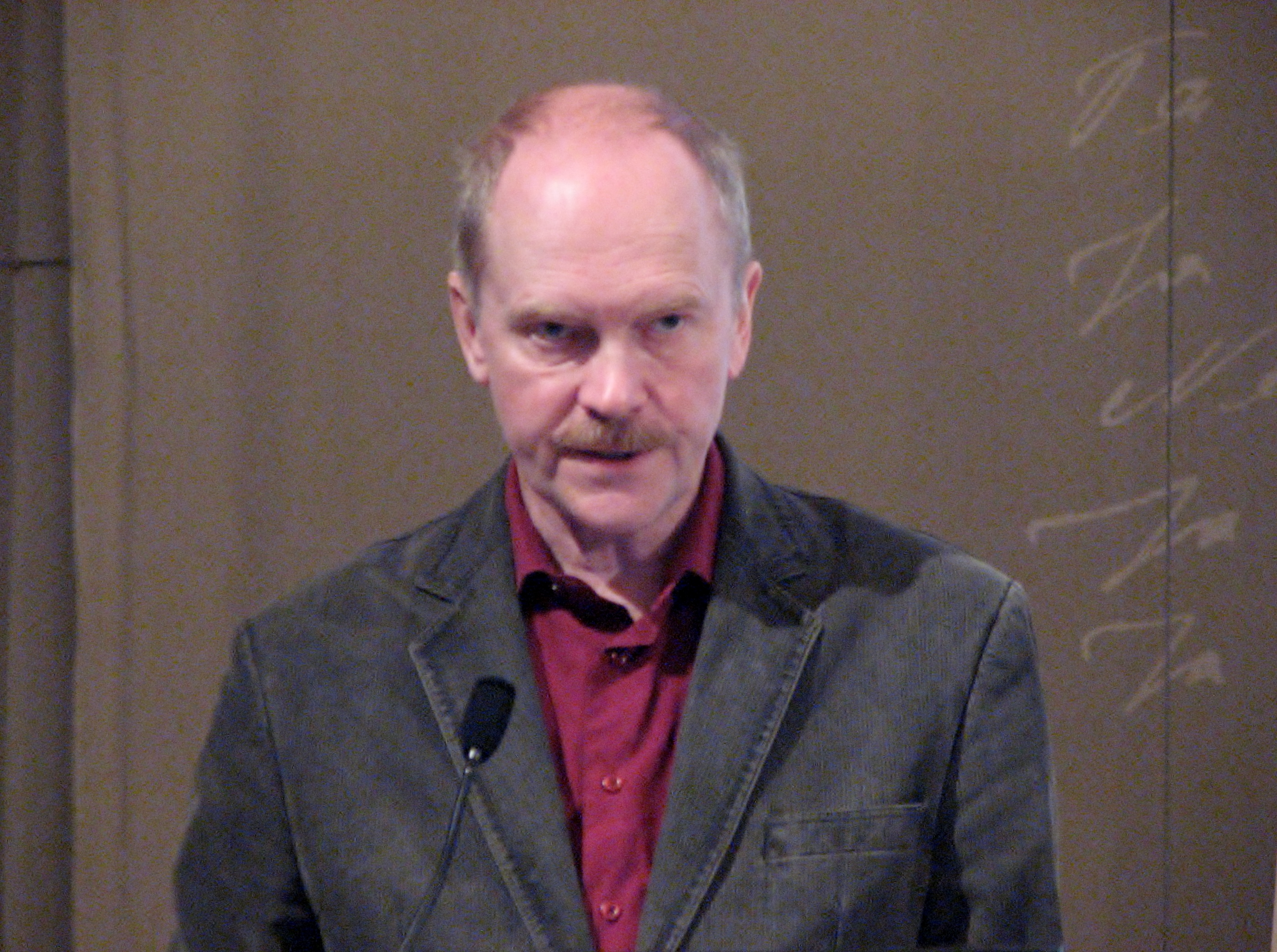 Laimantas Jonušys esinemas Eesti Rahvusraamatukogus Põhja- ja Baltimaade kirjandusfoorumil